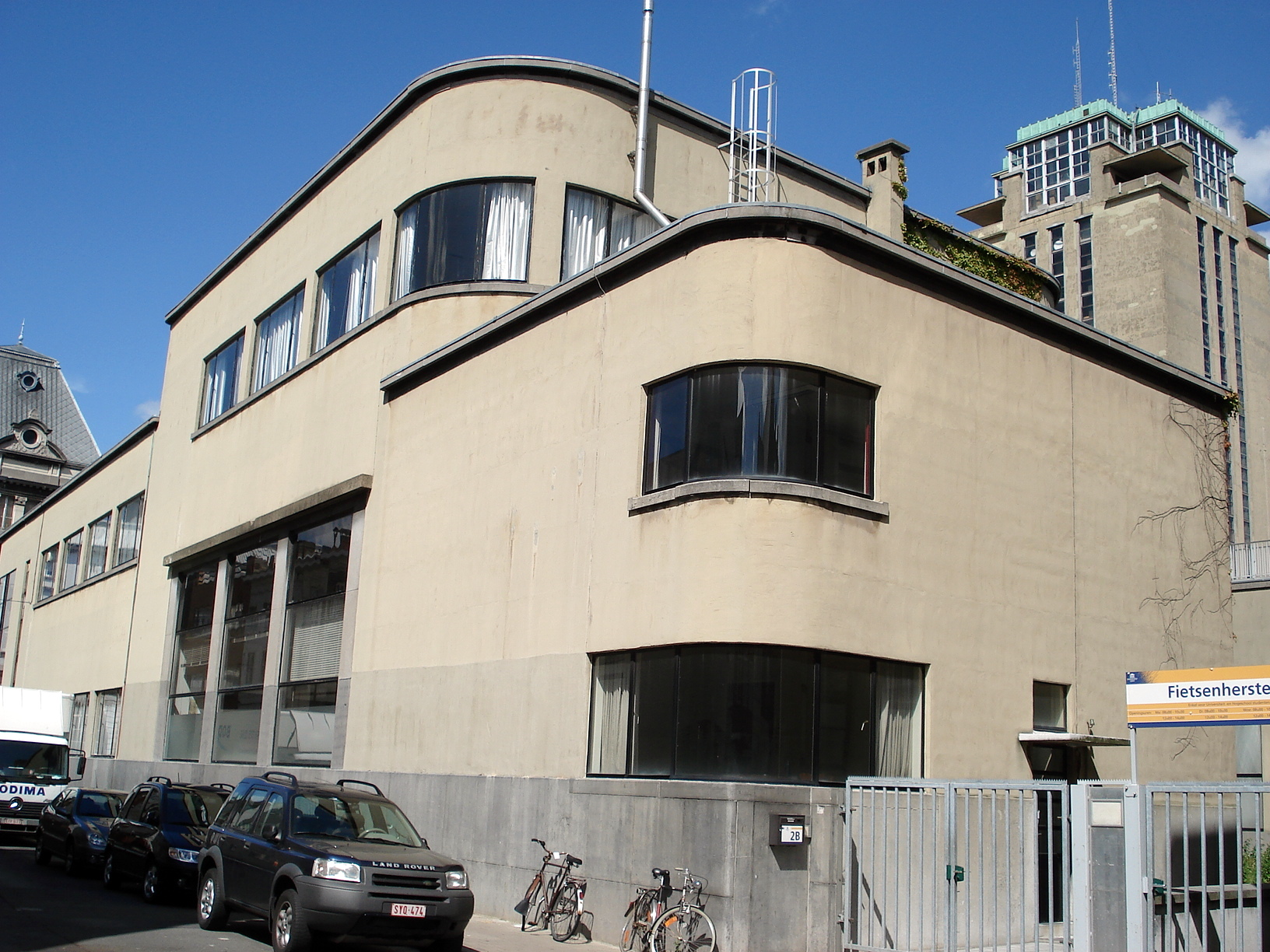 Faculté de Philosophie et Lettres de l'université de Gand, jouxtant la bibliothèque universitaire (arrière-plan à droite), toutes deux d'Henry Van de Velde.